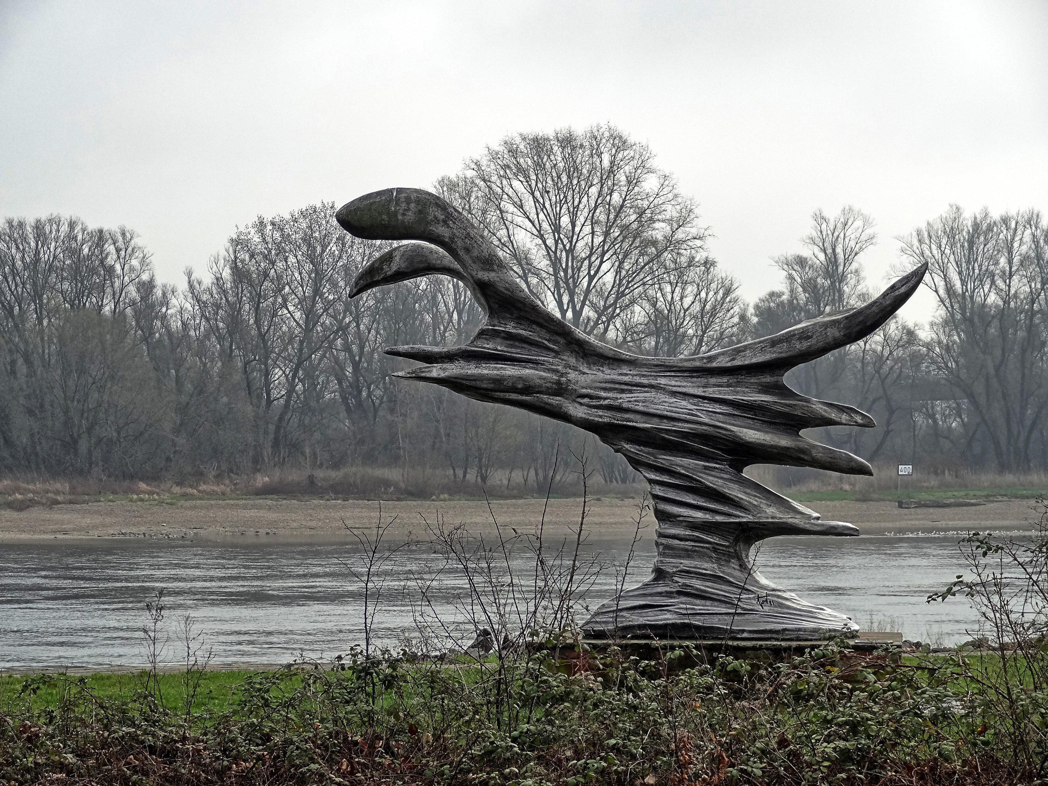 Skulptur “Die Welle” (1981), Aluminium, von Georg Günther Zeuner (*1923 Dresden; †2011 Speyer). Standort: Rheinpromenade, an der Mündung des Speyerbachs, Speyer. Gestiftet der Stadt Speyer von der Grünzweig + Hartmann AG anlässlich ihres hundertjährigen Firmenjubiläums.